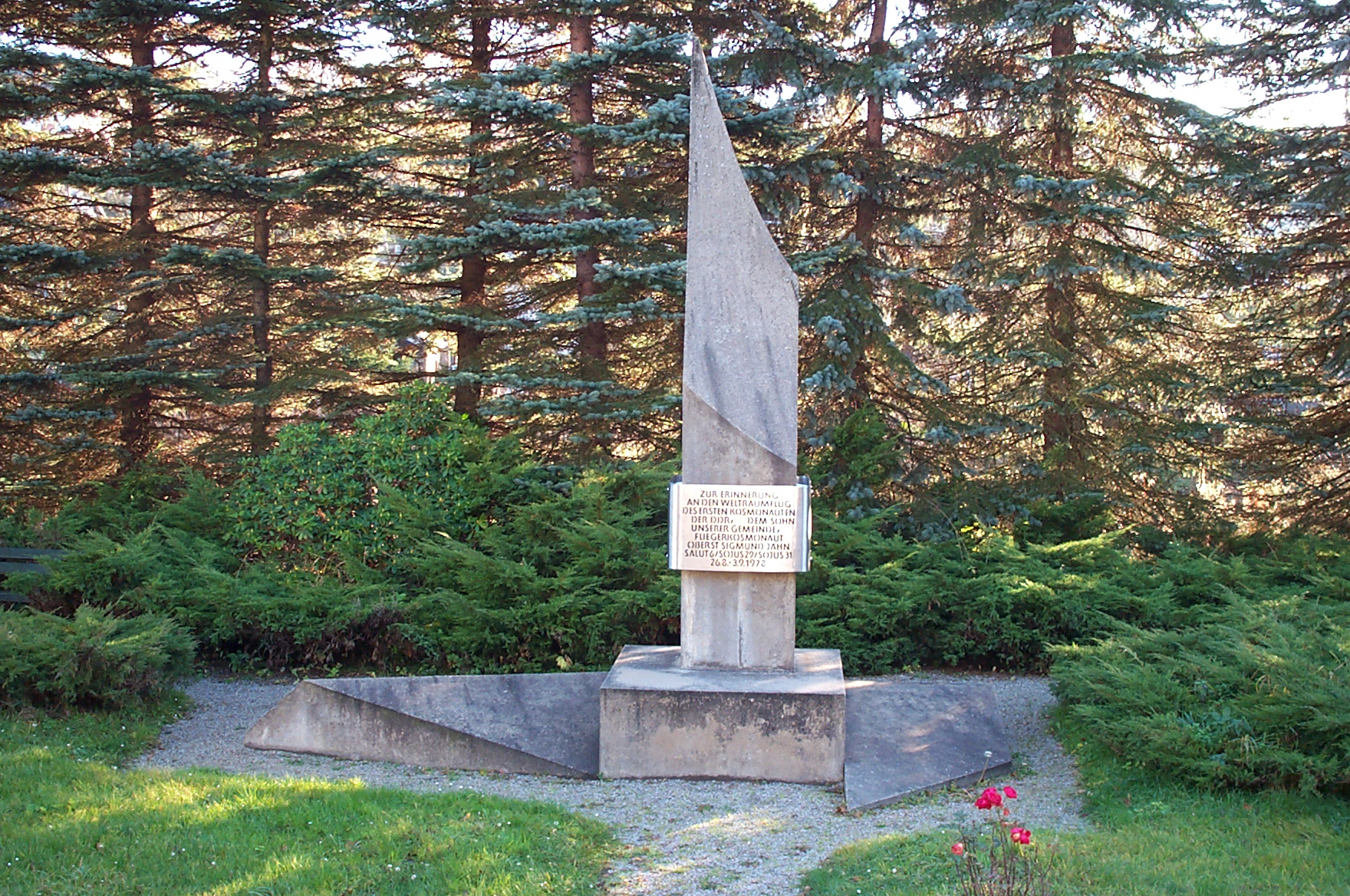 Stele zur Erinnerung an Weltraumflug von Sigmund Jähn. Text: Zur Erinnerung / an den Weltraumflug / des ersten Kosmonauten / der DDR, dem Sohn / unserer Gemeinde, / Fliegerkosmonaut / Oberst Sigmund Jähn / Salut6/Sojus29/Sojus31 / 26.8.-3.9.1978